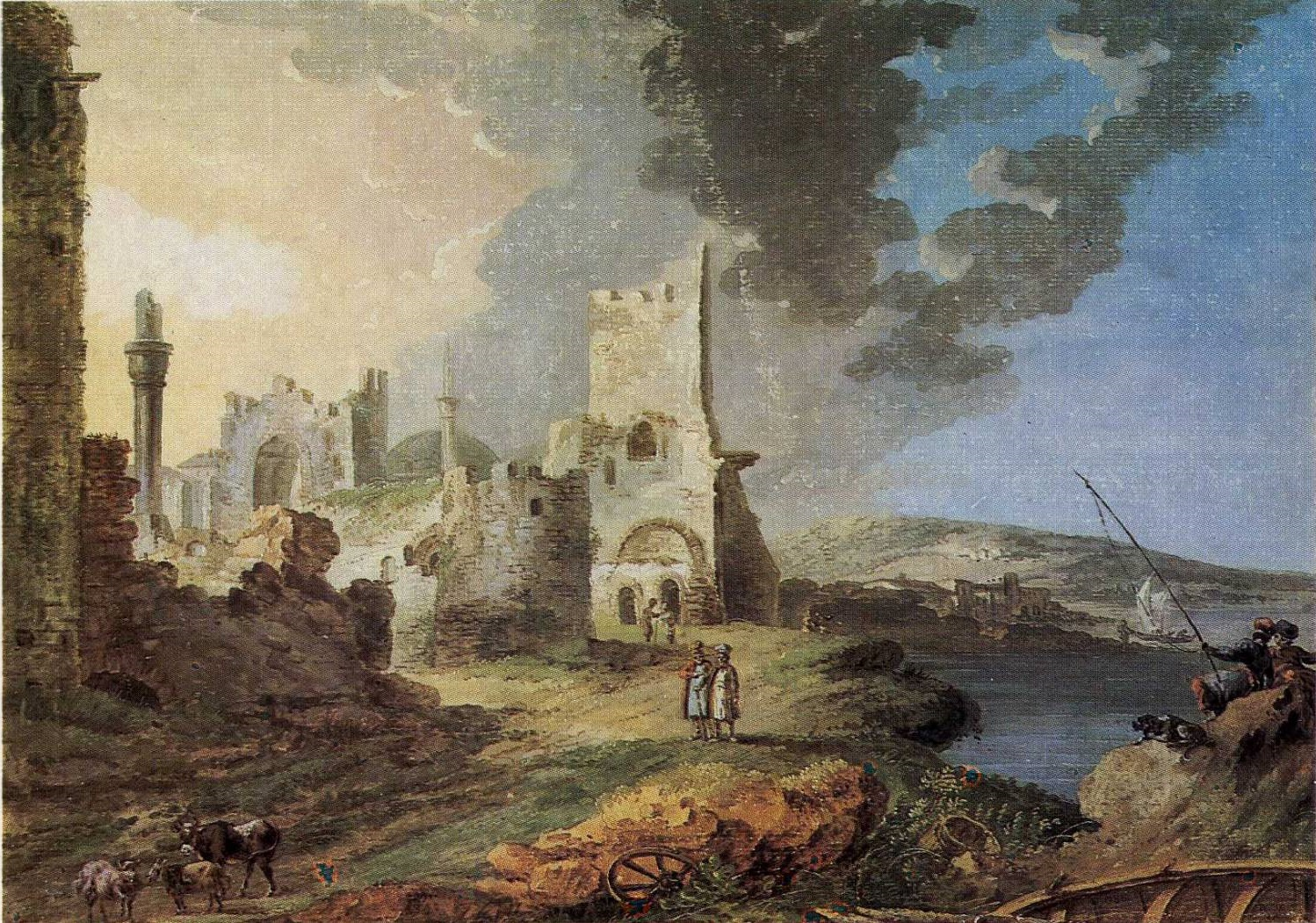 Ruined Caffa, some years after Crimean annexation by Russia in 1783